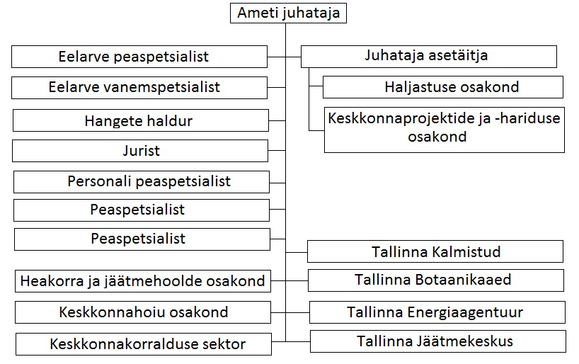 Tallinna Keskkonnaameti struktuur